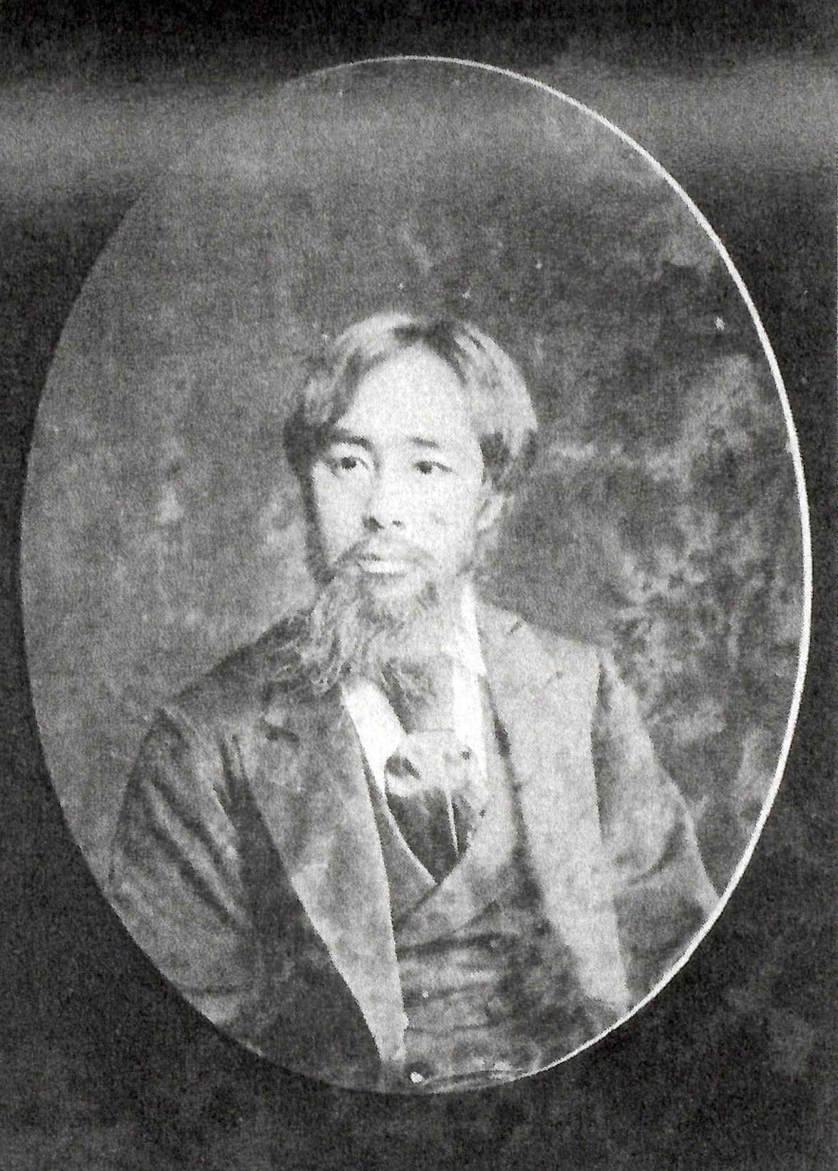 小笠原貞孚の肖像写真。